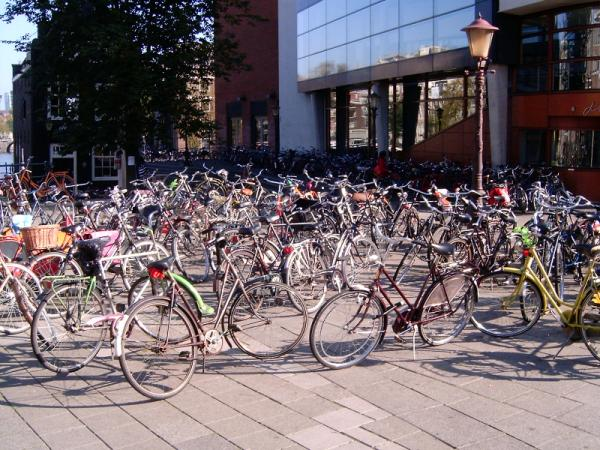 Fietsen. Eigen werk.